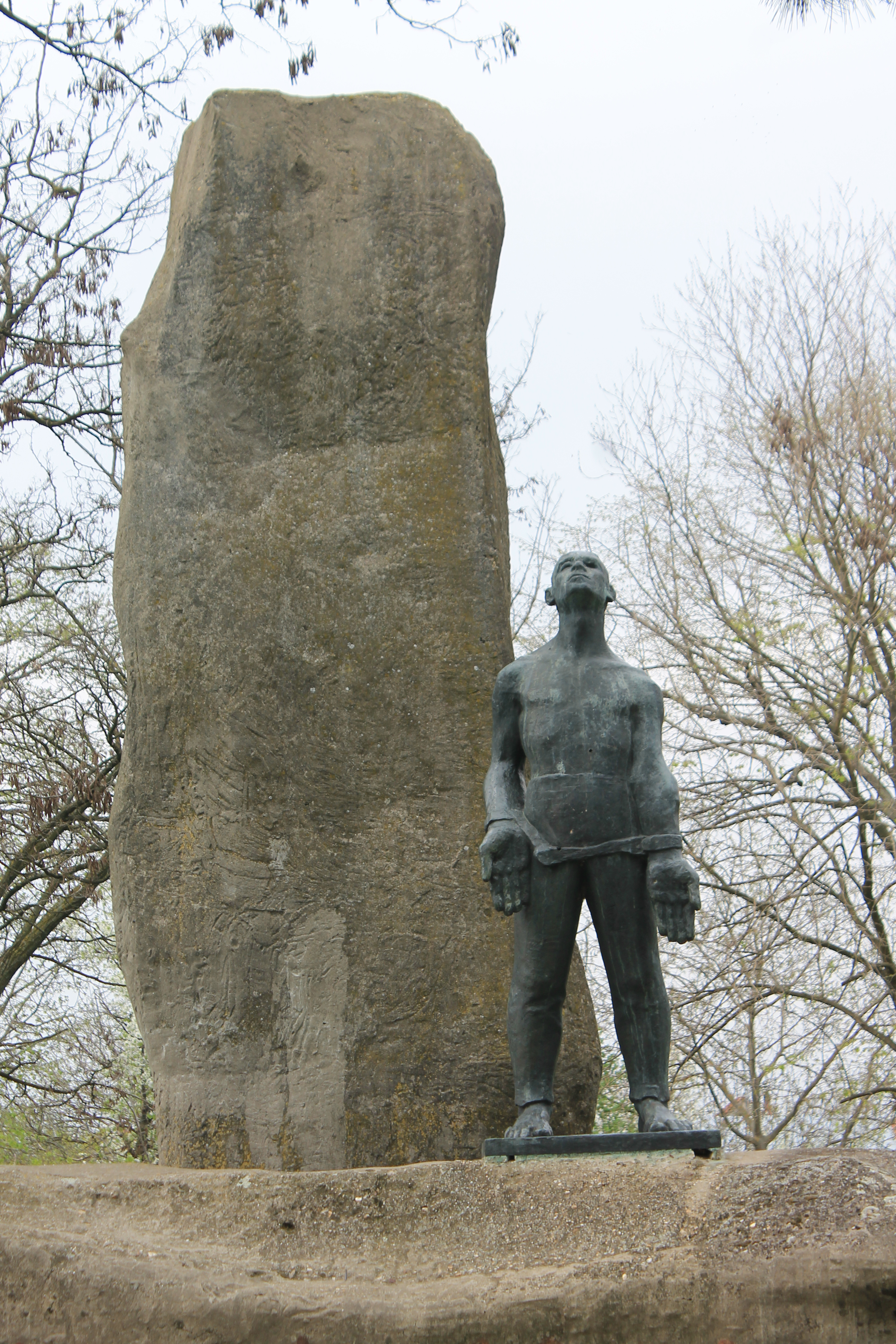 Čalma